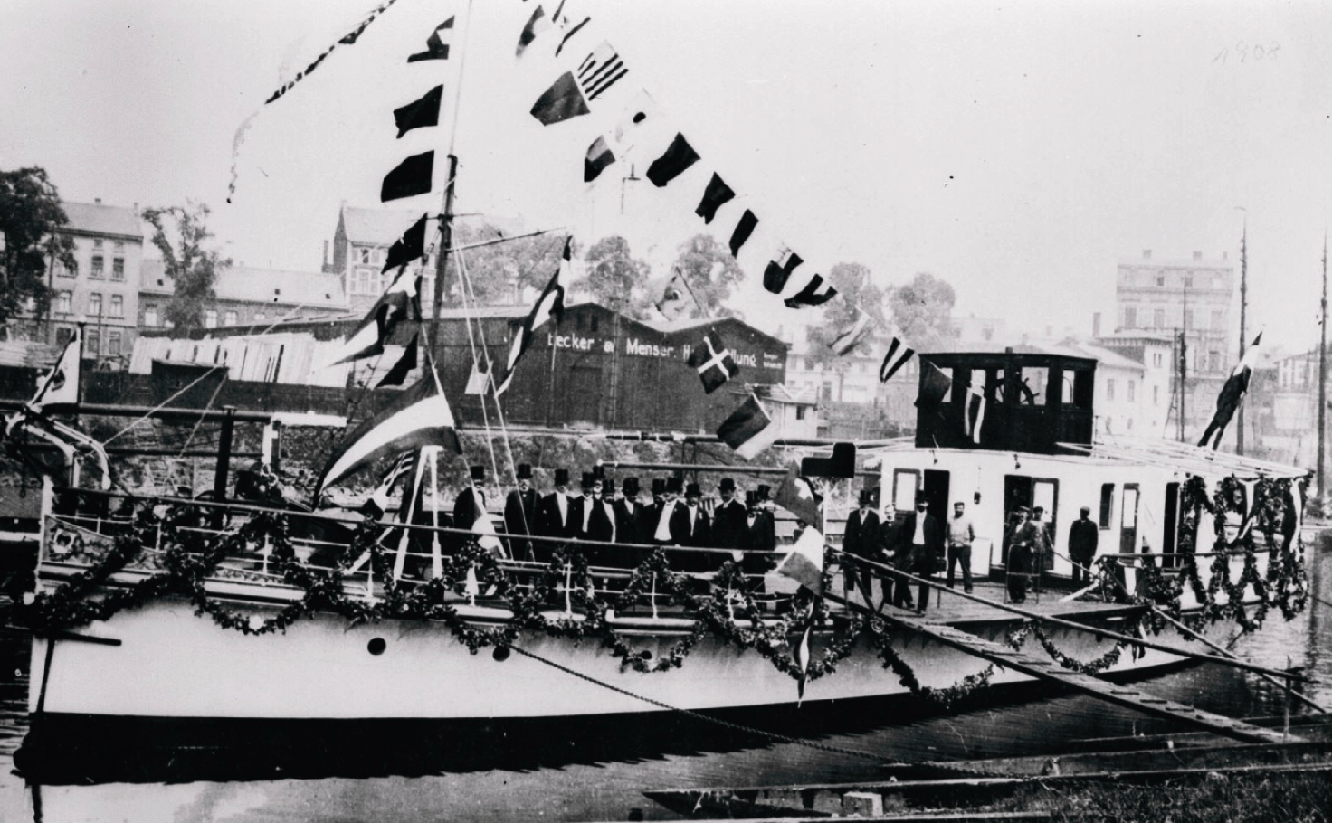 Duisburg, Fa. Berninghaus: Stapellauf der ersten elektrisch betriebenen Rheinfähre für die Verbindung zwischen Godesberg (Bonn) und Niederdollendorf (Königswinter).